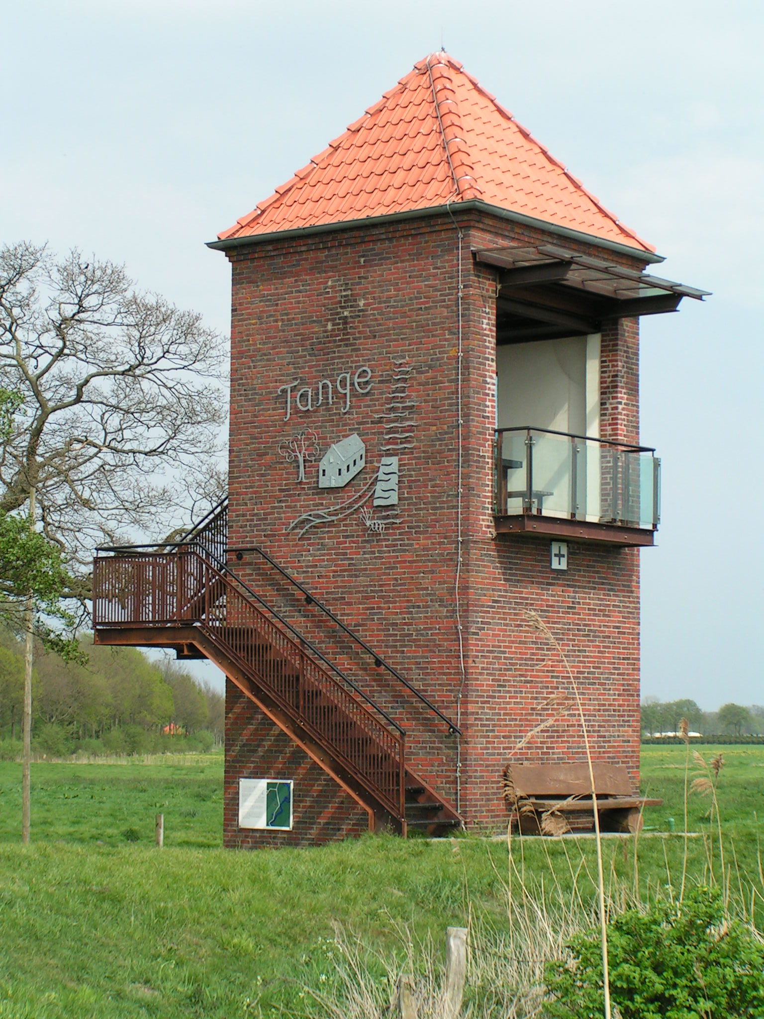 Landschaftsfenster Tange am Barßeler Tief